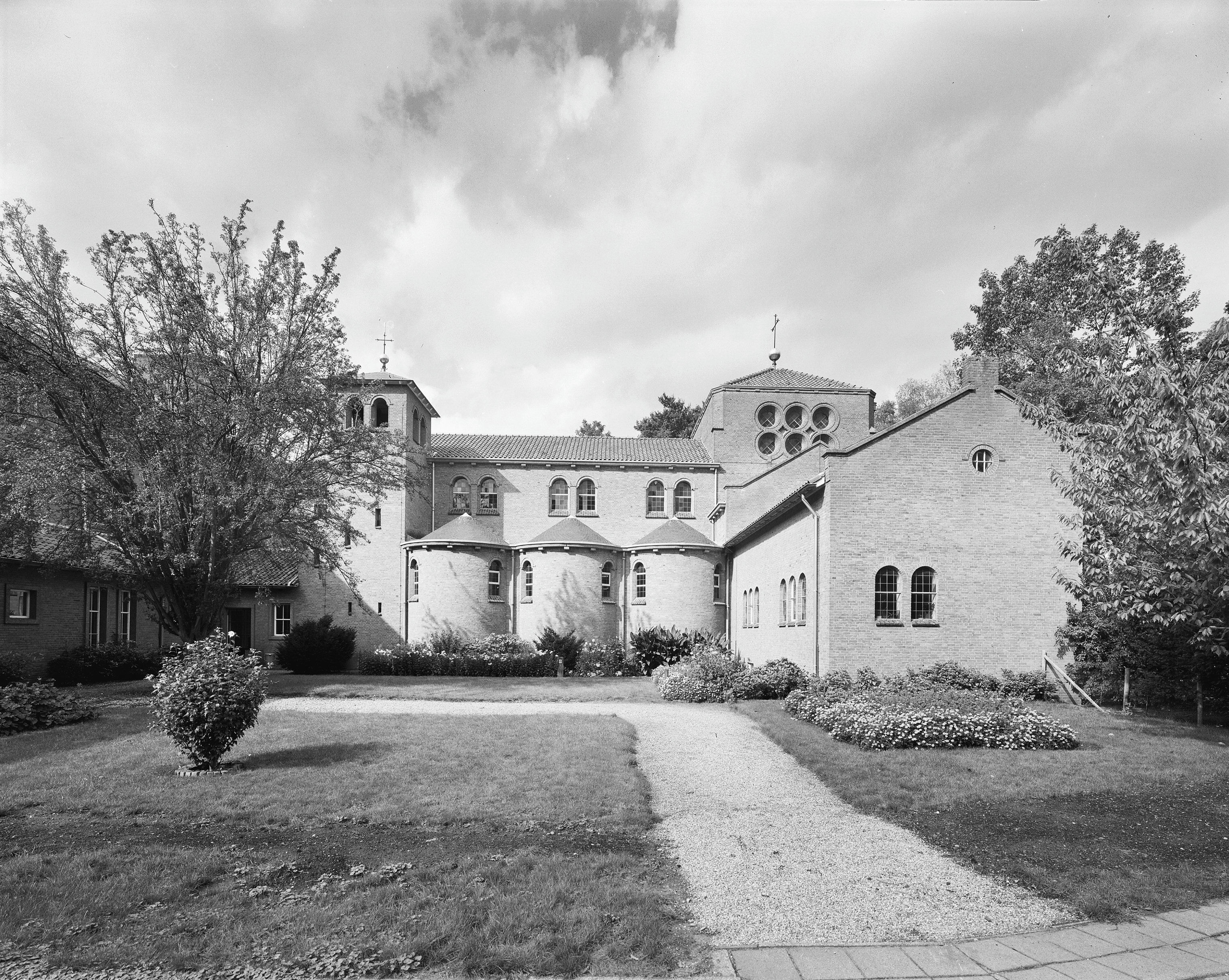 H. Johannes De Doper Parochie (Voorheen Phylosoficum): Overzicht kapel naast huis Dijnselburg (opmerking: Gefotografeerd voor De Utrechtse Heuvelrug)